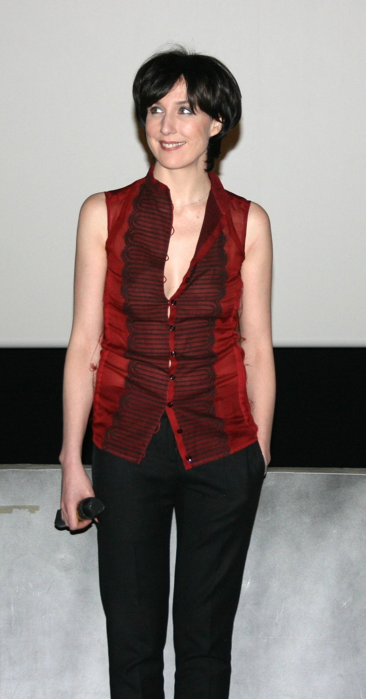 Elsa Zylberstein à l'avant-première de La Fabrique des sentiments diffusée à l'UGC Ciné Cité Les Halles, à Paris.